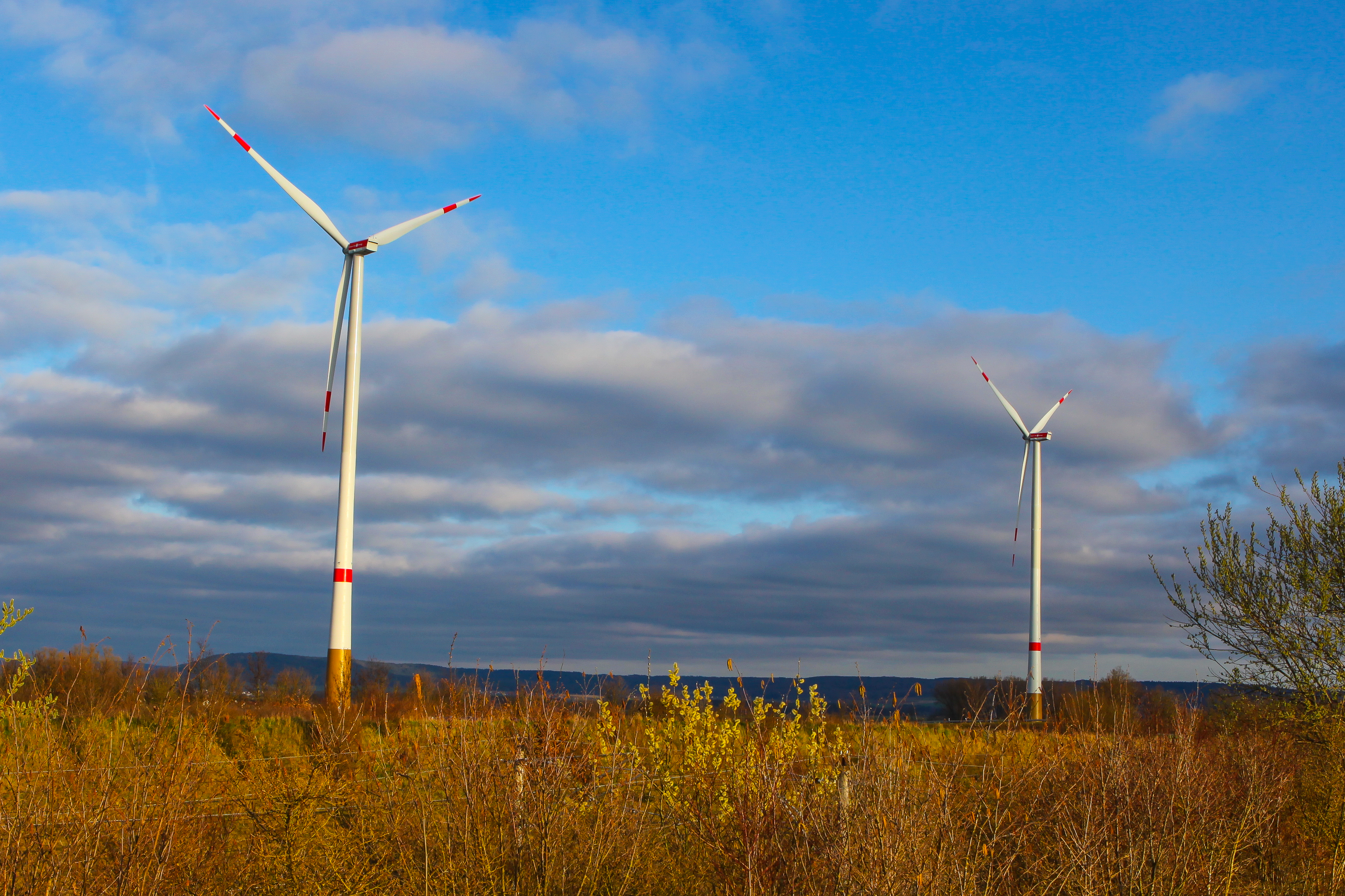 Windpark Sindersdorf